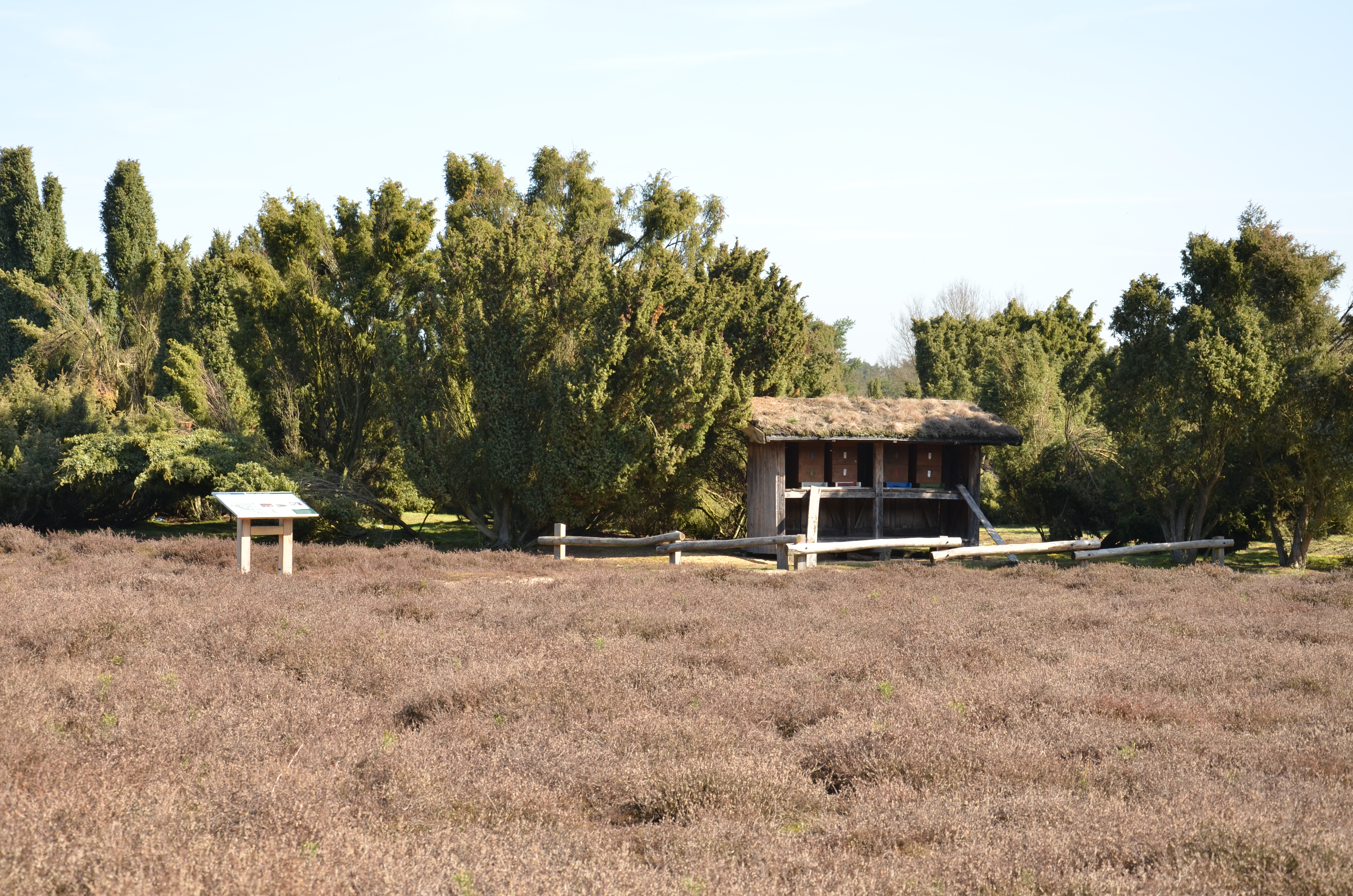 Westruper Heide in Haltern am See auf dem Weg zum Bienenstock